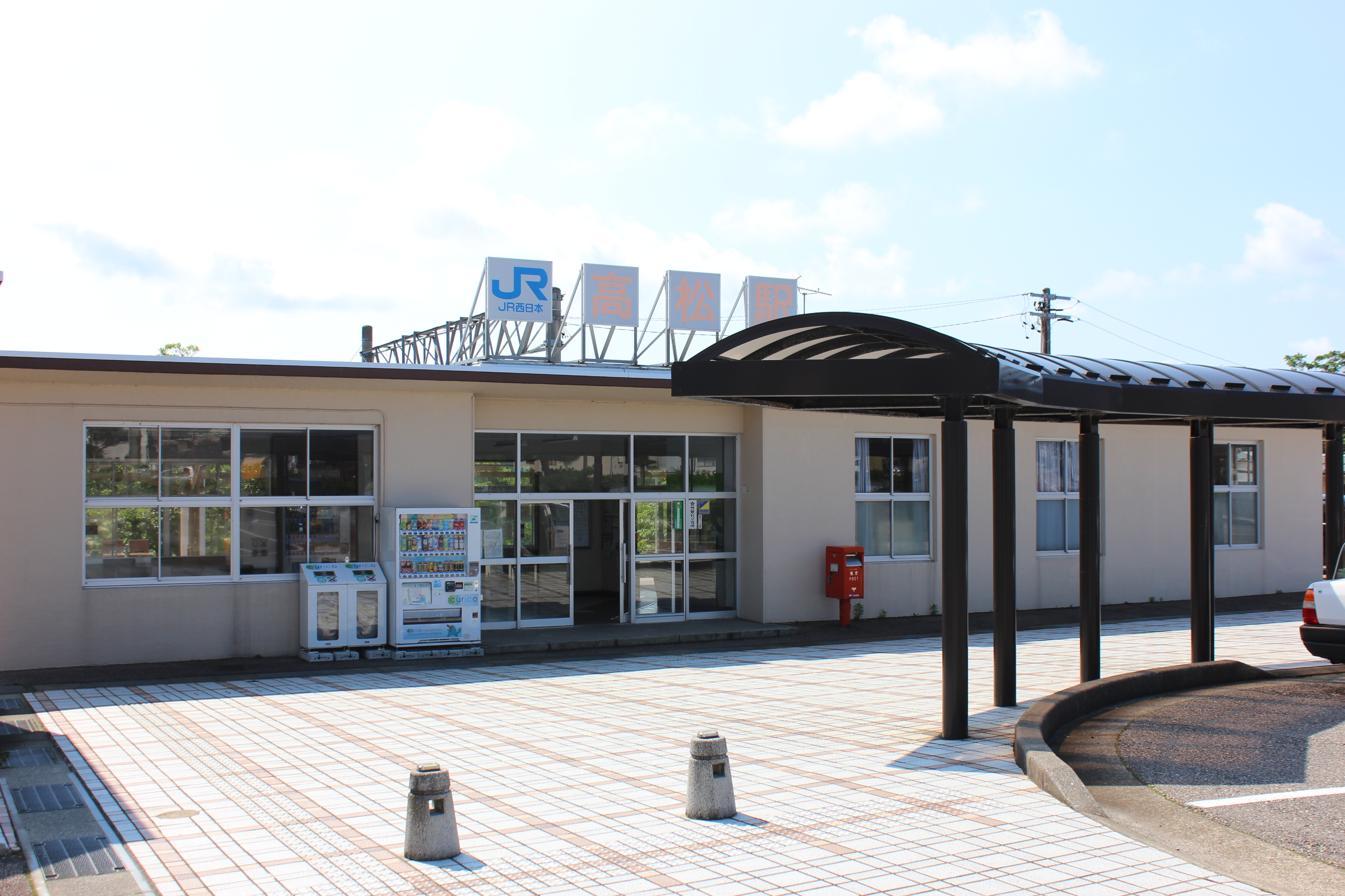 高松駅（石川県かほく市） Canon EOS Kiss X5